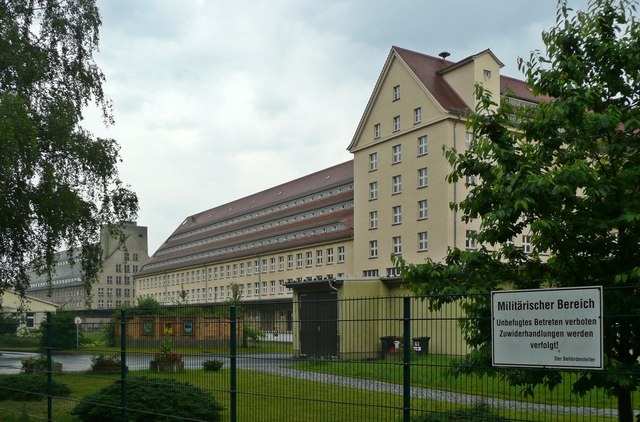 Prossen: Blick auf das Bekleidungszentrum der Bundeswehr